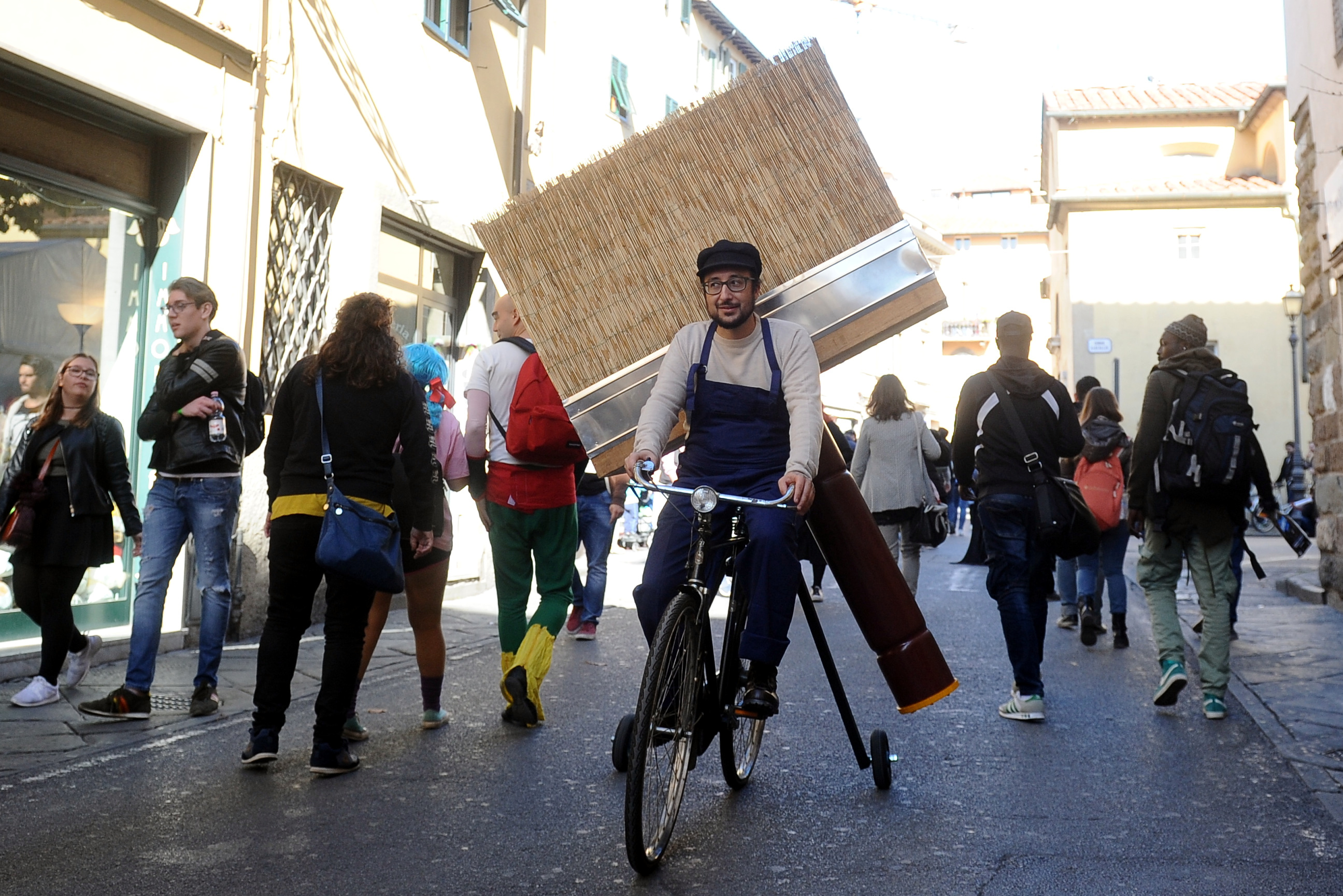 Un cosplay a Lucca Comics 2017, rappresentate una nota pubblicità dell'aziende Pennelli Cinghiale